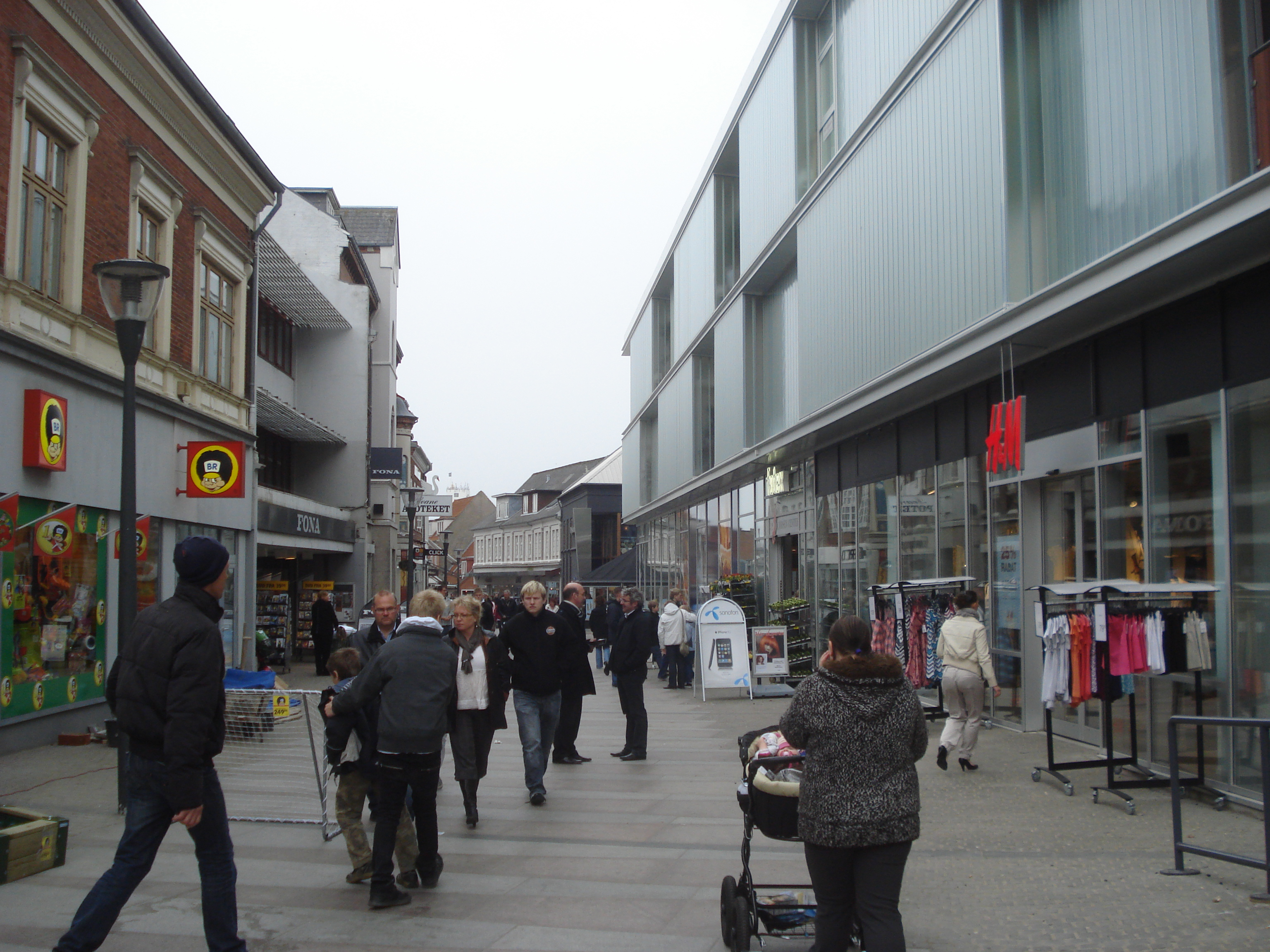 Gågaden Storegade i Thisted.